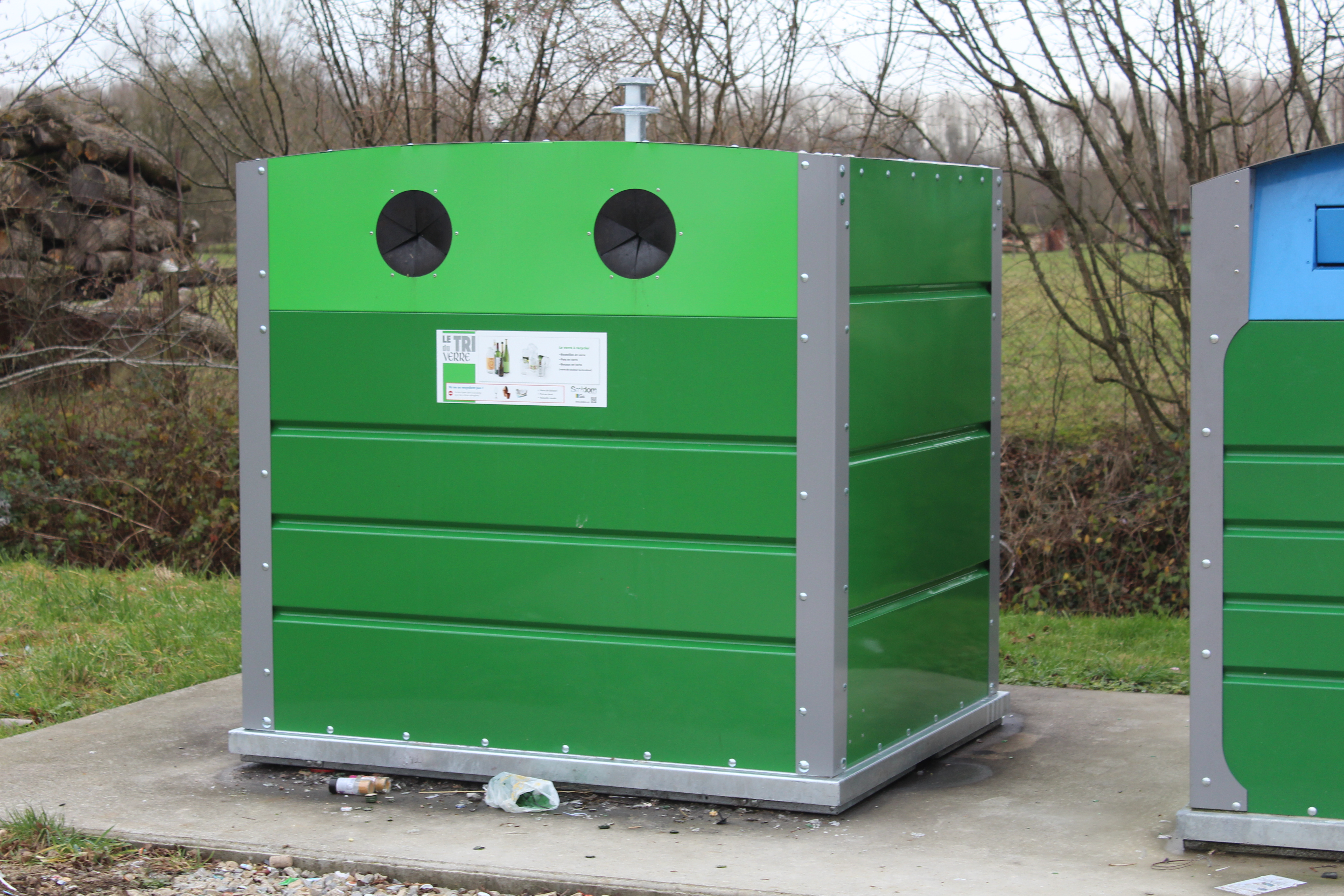 Point propreté, route de la Croix, Saint-Cyr-sur-Menthon.